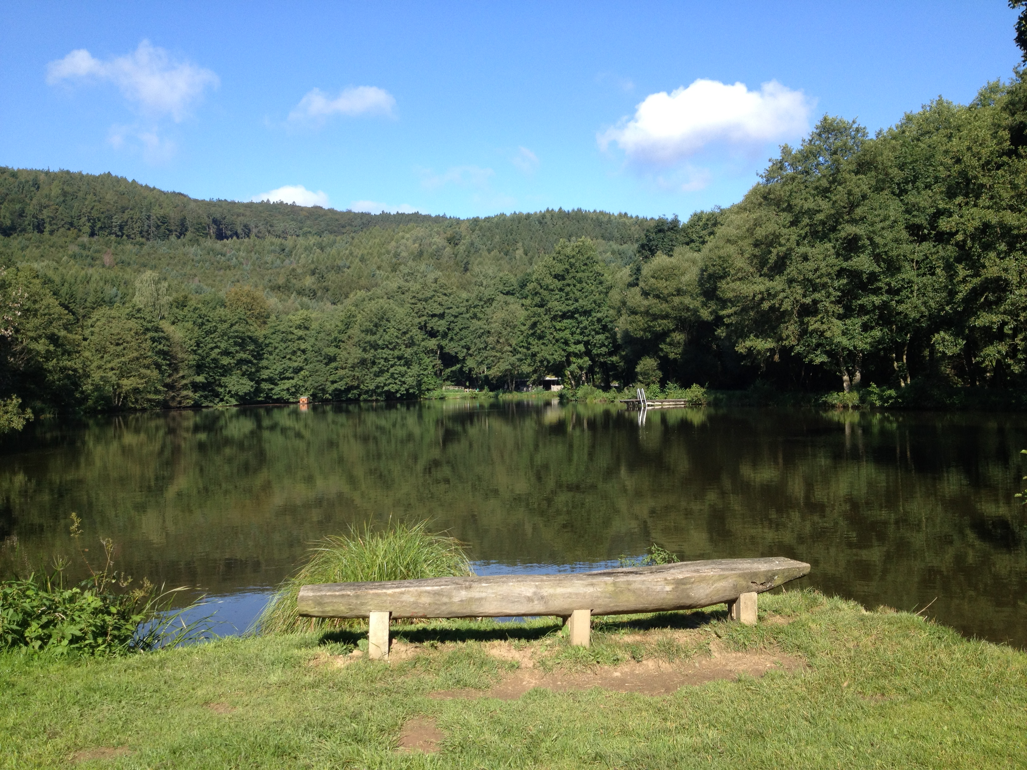 Der Oberurffer See bei Oberurff-Schiffelborn am Hessischen Radfernweg R5